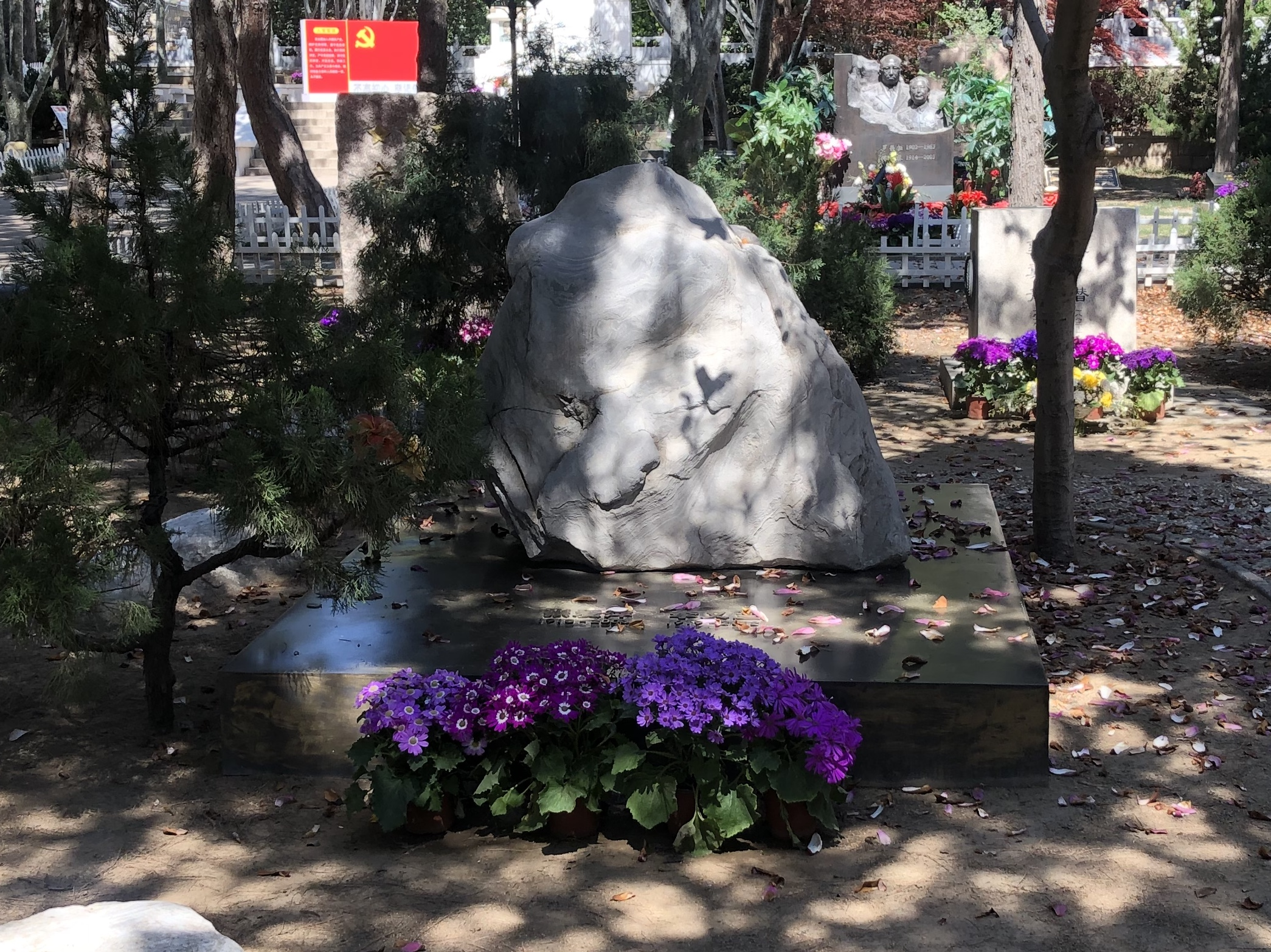 张爱萍将军与其妻李又兰合葬墓，位于八宝山革命公墓内。张爱萍曾任第六任中华人民共和国国防部部长等职。